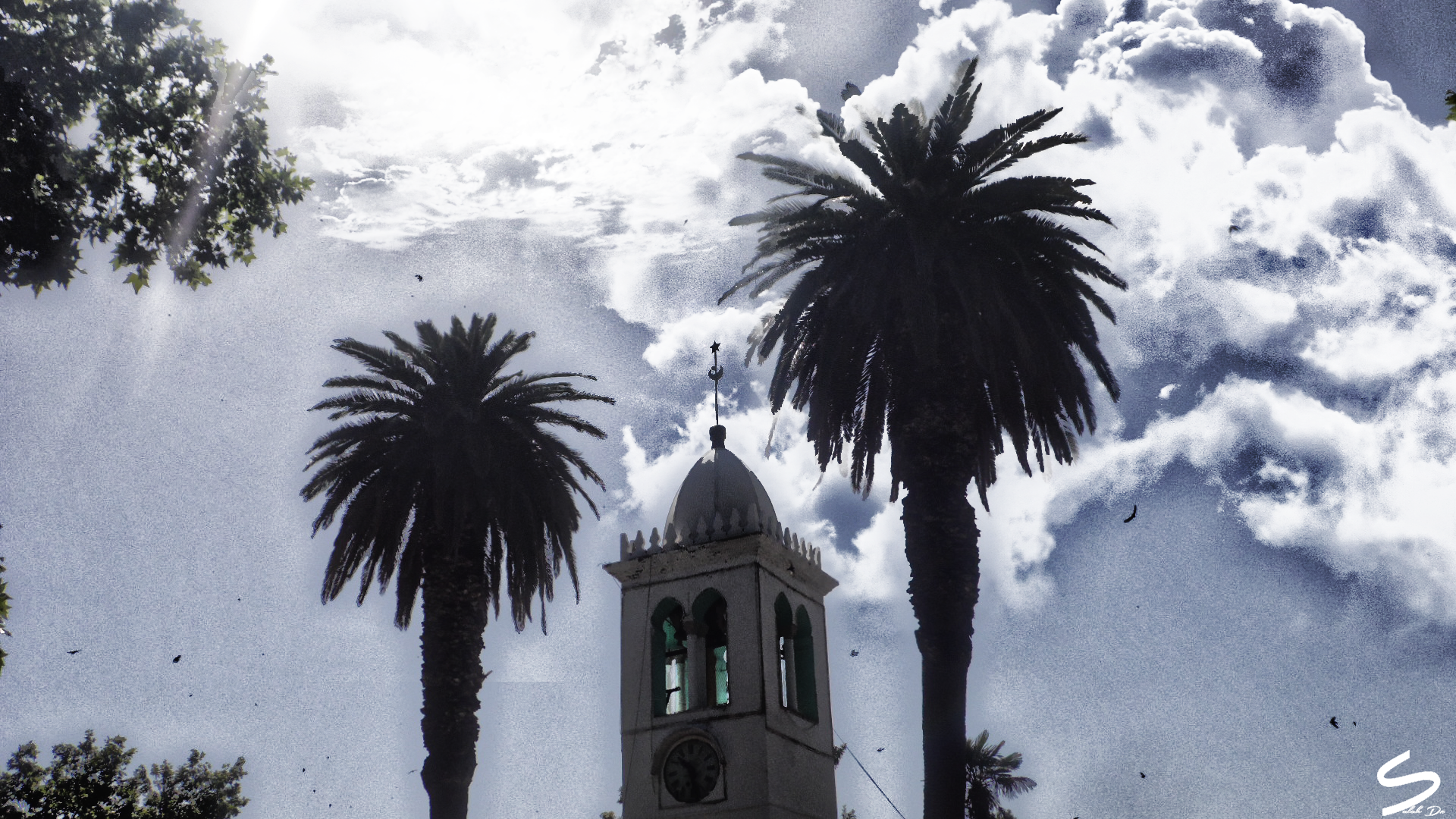 ساعة مليانة